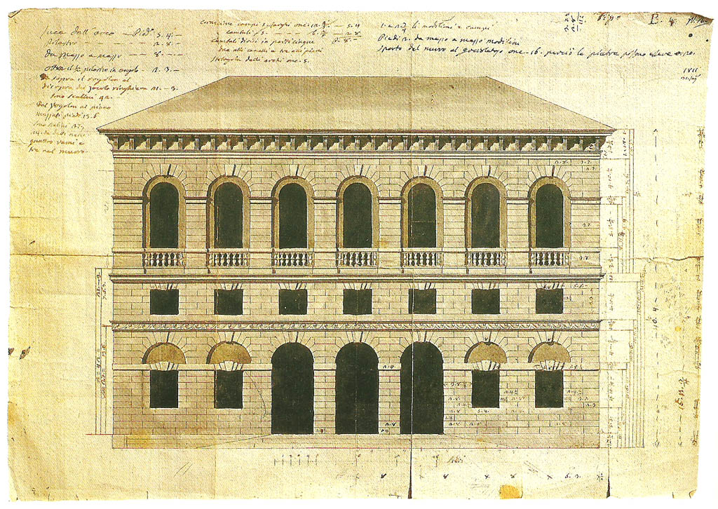 Progetto per il palazzo municipale di Monteforte d'Alpone. Prospetto principale.